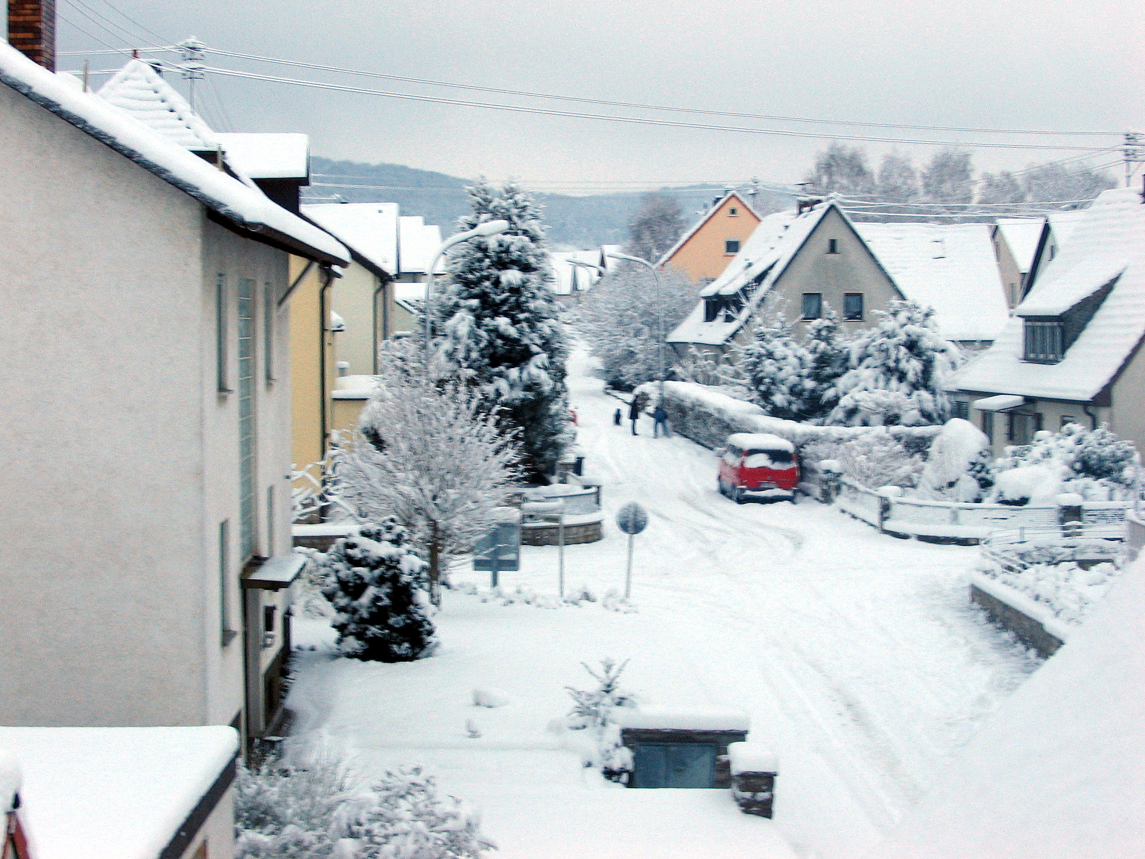 selber fotografiert